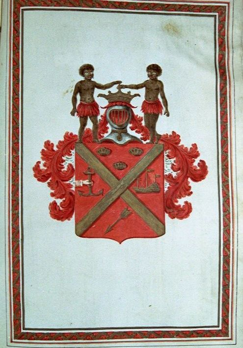 Adelsdiplom J.A. von Quast 1789